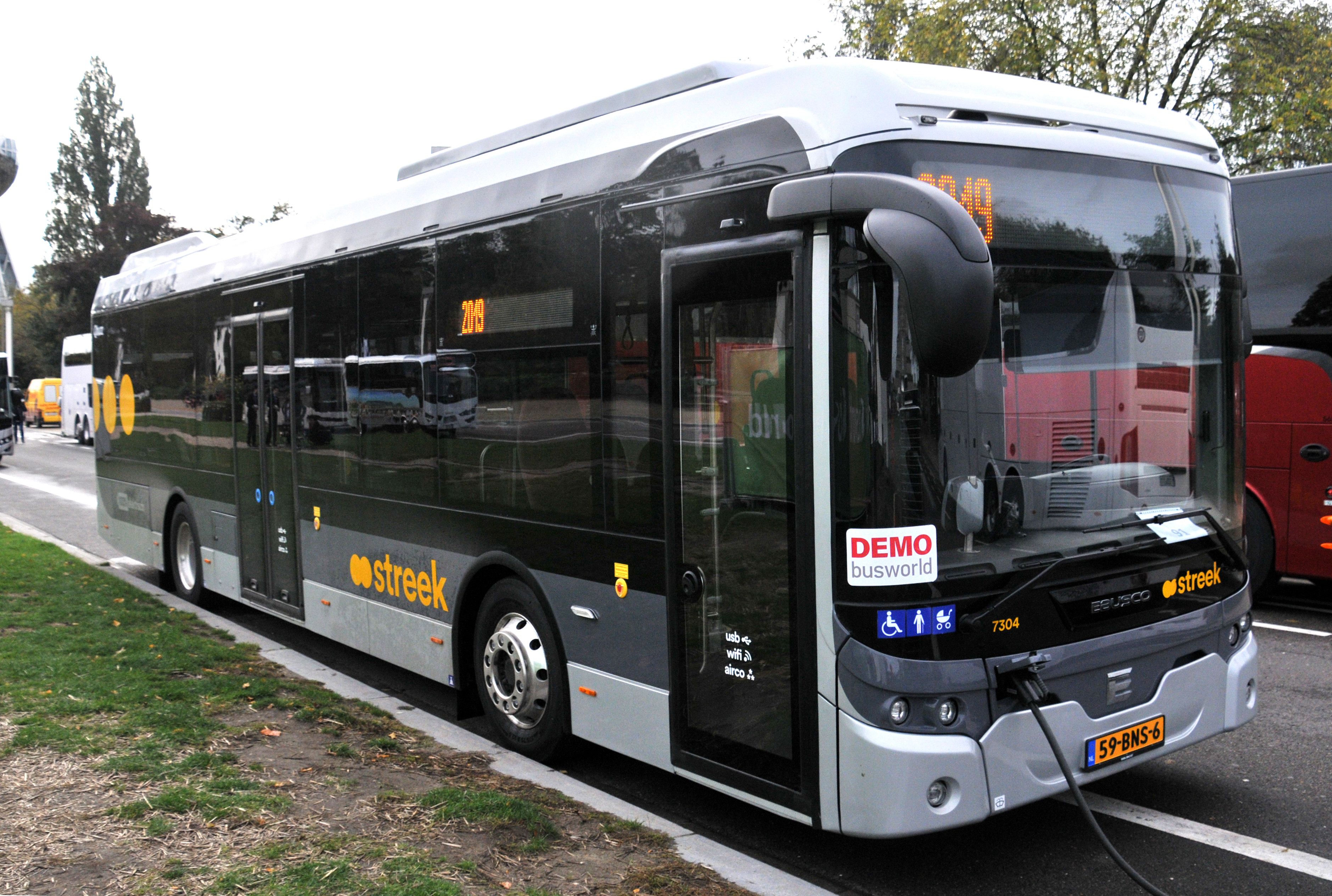 Qbuzz bus 7304 (kent: 59-BNS-6), Ebusco 2.2 elektrische bus, 12 meter te Brussel.